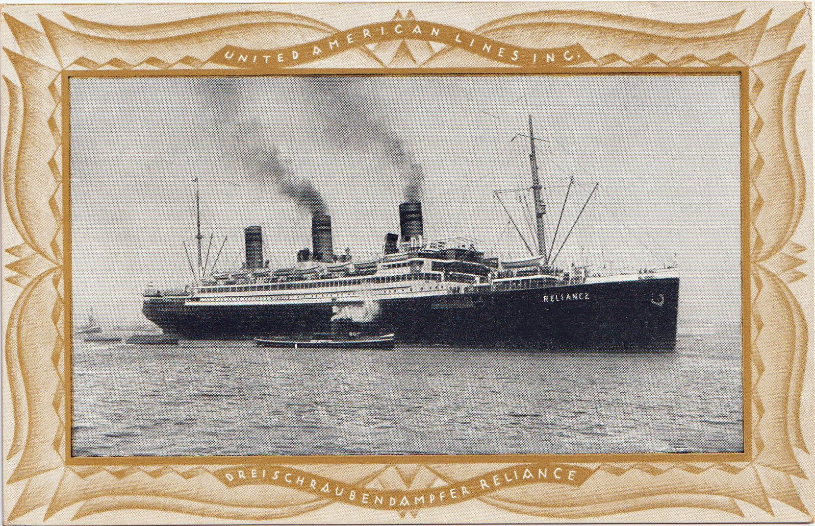 Dampfer Reliance, 1922